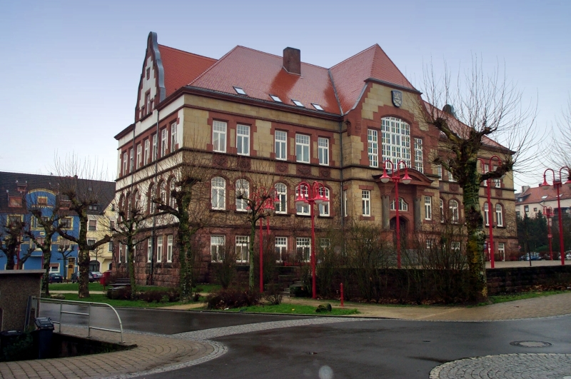 Rathaus in 66299 Friedrichsthal (Saarland)